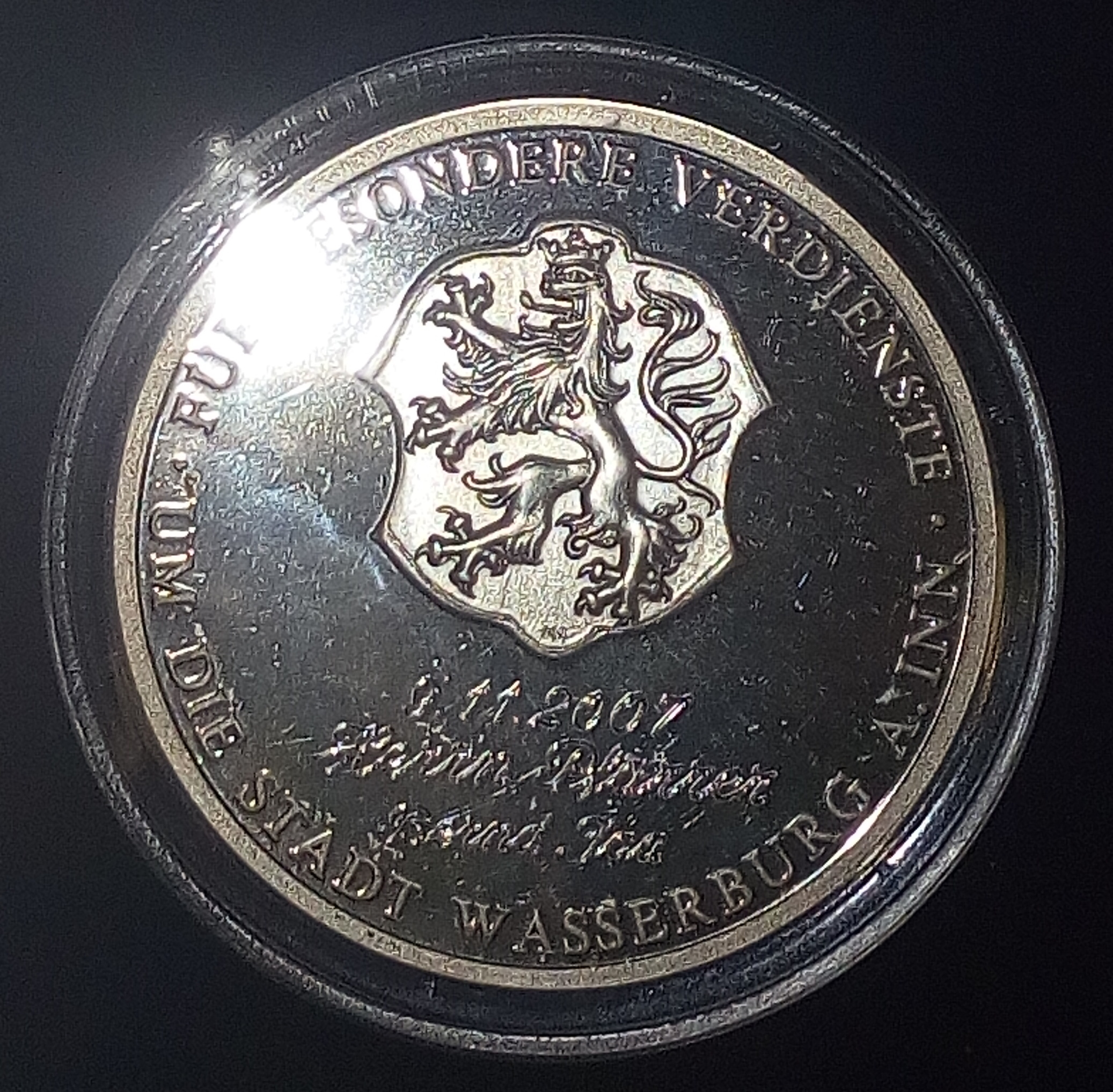 Foto der Heiserer-Medaille, die an verdiente Wasserburger Bürger verliehen wird